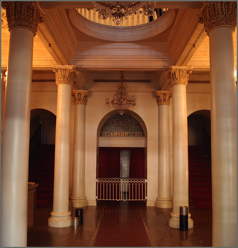 Saguão do Theatro São Pedro, Porto Alegre, Brasil.